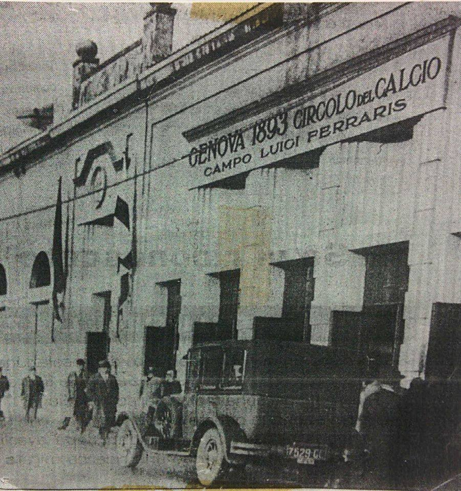 Biglietteria dello Stadio Luigi Ferraris di Genova dopo il 1933. E' visibile parcheggiata una Fiat 509 (?) con targha post 1927.